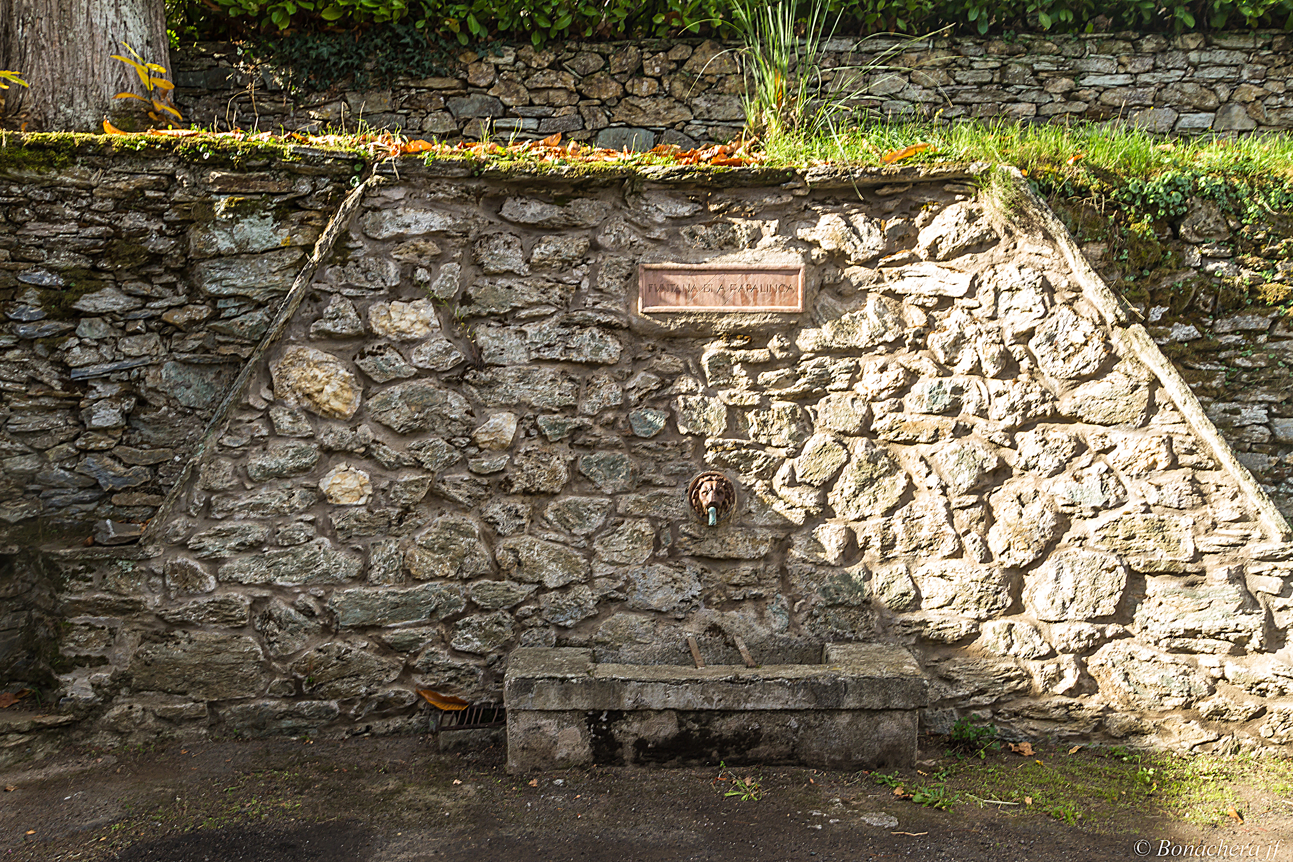 Corsu: Rapale (Corsica) - Funtana di a Rapalinca